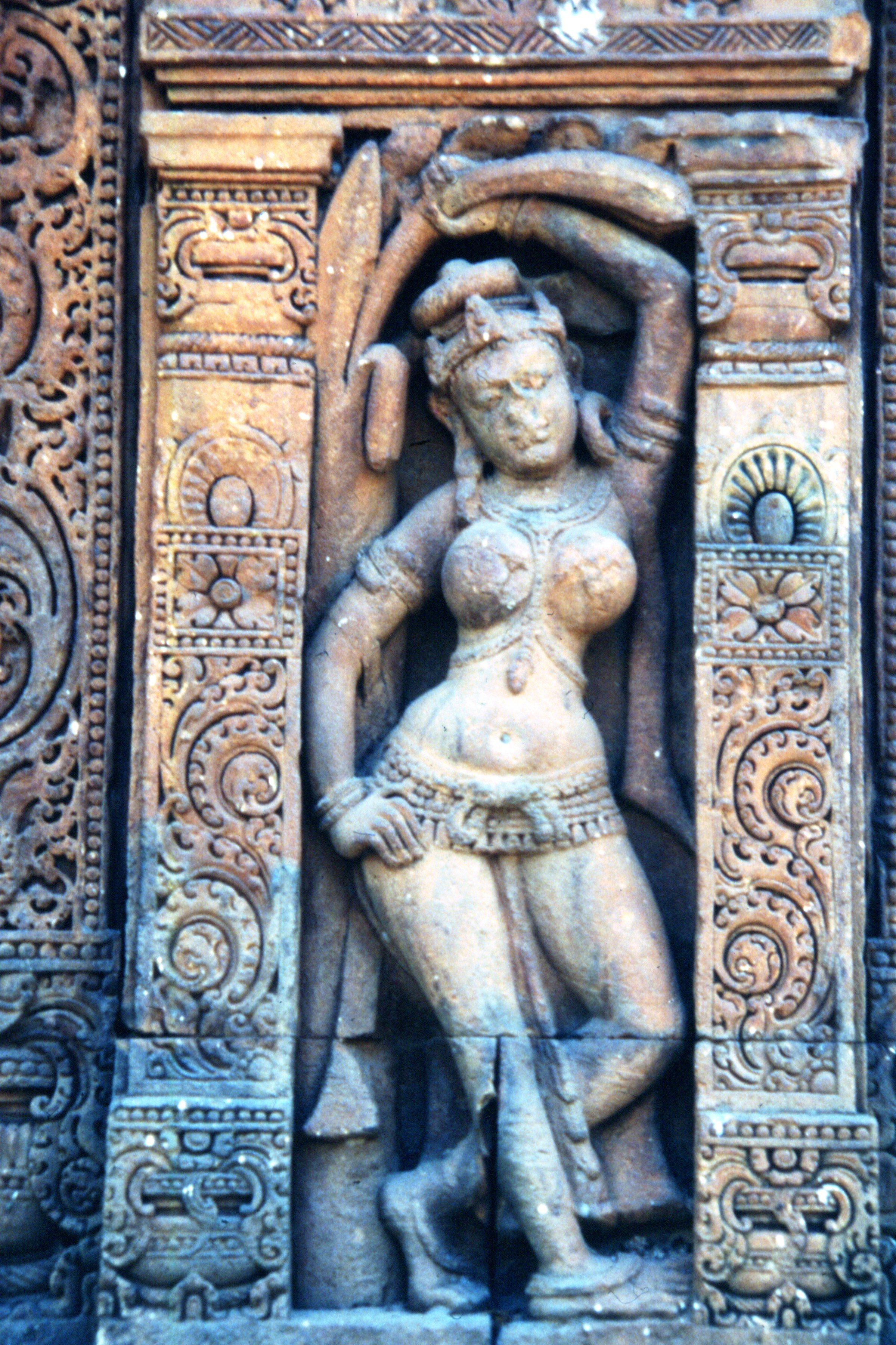 Siglo VIII, Templo Vaital Deul/Baitala Deula, Detalle de la escultura de una ápsara sosteniendose de una hoja de plátano , Bhuvanesvar, Orissa, India.